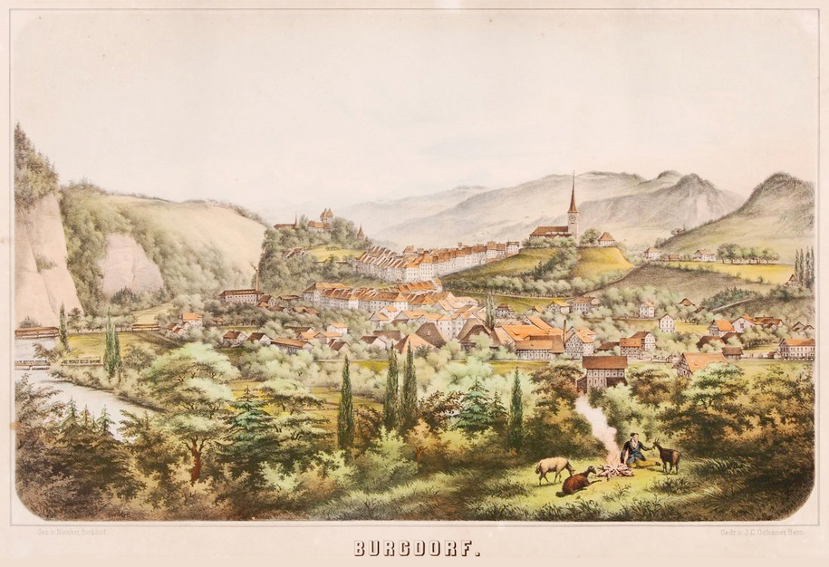 Burgdorf BE